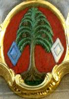 Ausschnitt aus der "Thanner Freiung", eine über 250 Jahre alte Holzschnitzerei welche nun neu restauriert außen am alten Rathaus am Tanner Marktplatz hängt.